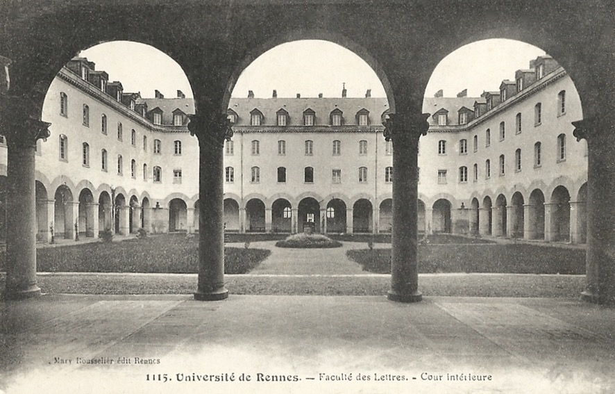 Université Rennes, faculté des Lettres, cour intérieure, carte postale ancienne.